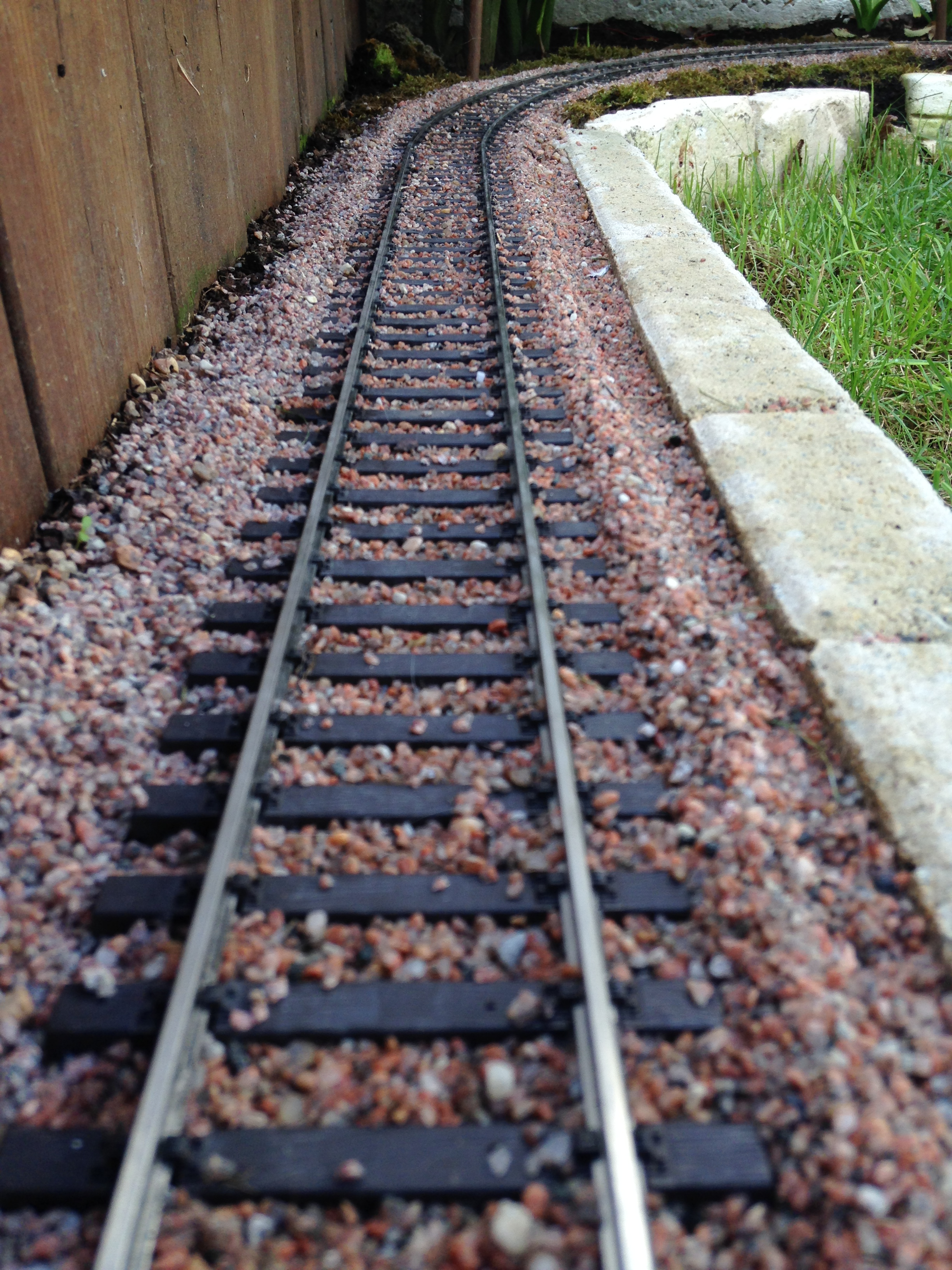 Märklin Gleis Spur 1